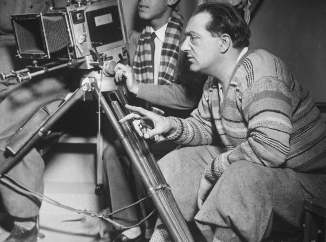 "Die Frau im Mond" Der bekannte Regisseur Fritz Lang bei den Aufnahmen des Weltraum-Films "Frau im Mond", dessen Uraufführung mit grosser Spannung entgegen gesehen wird.